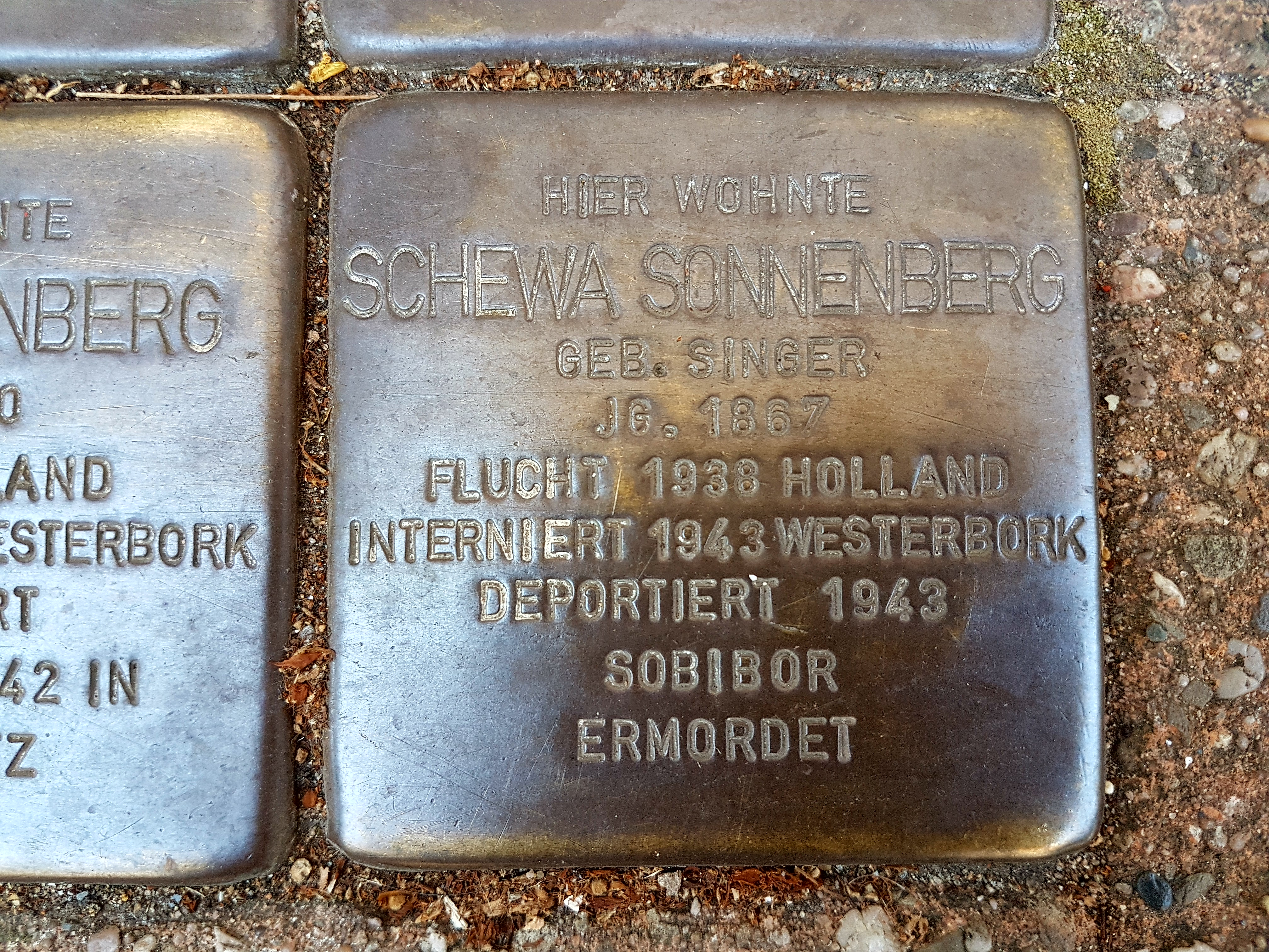 Schewa Sonnenberg Stolpersteine Duisburg